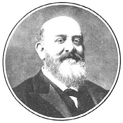 Retrato de Antonio Barroso Castillo, fotografiado por Christian Franzen y recogido en la revista española Nuevo Mundo.